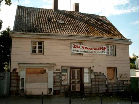 One of the oldest houses of Witten in August 2006, demolished in 2009; Oberstraße, Witten-Mitte